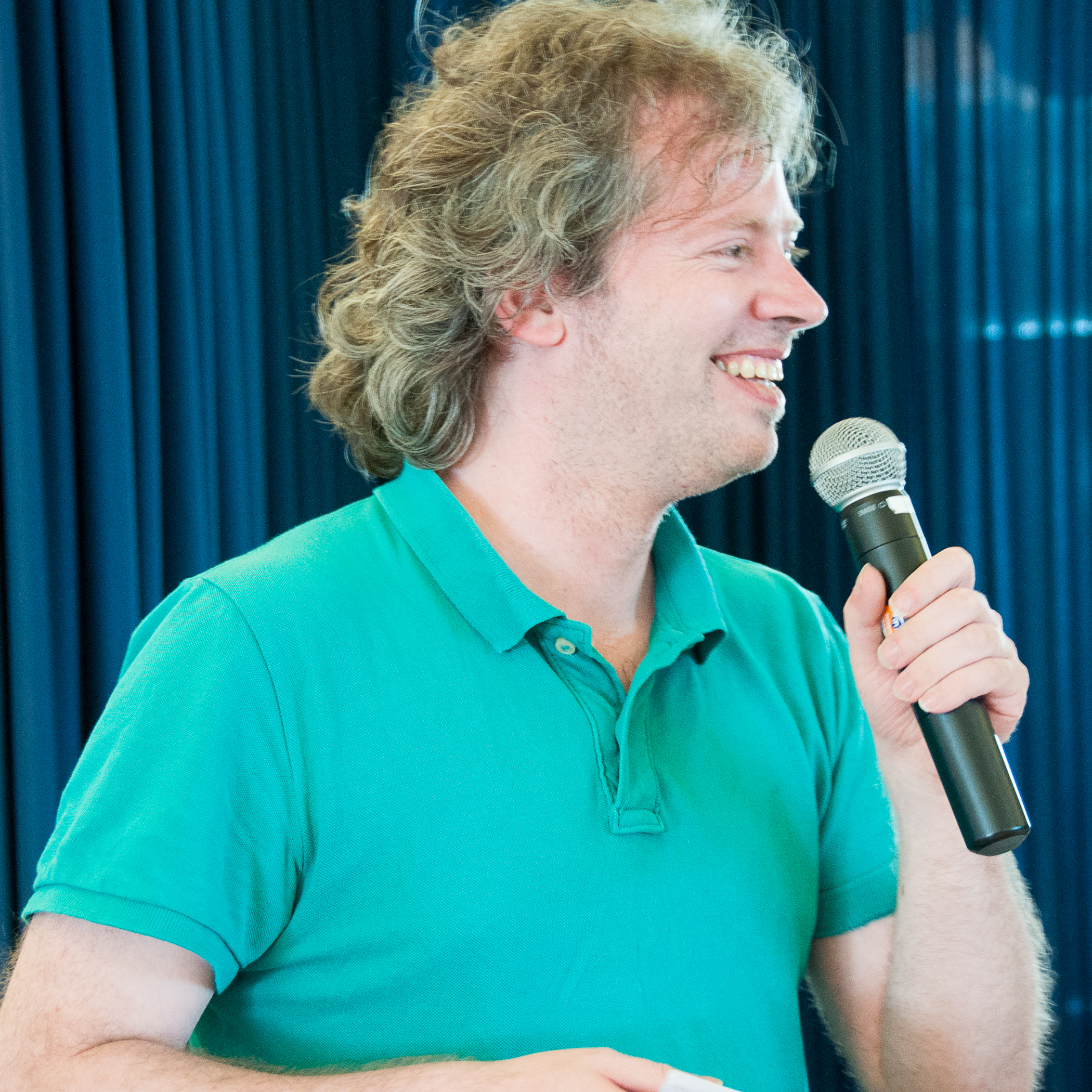 GM Dimitri Reinderman